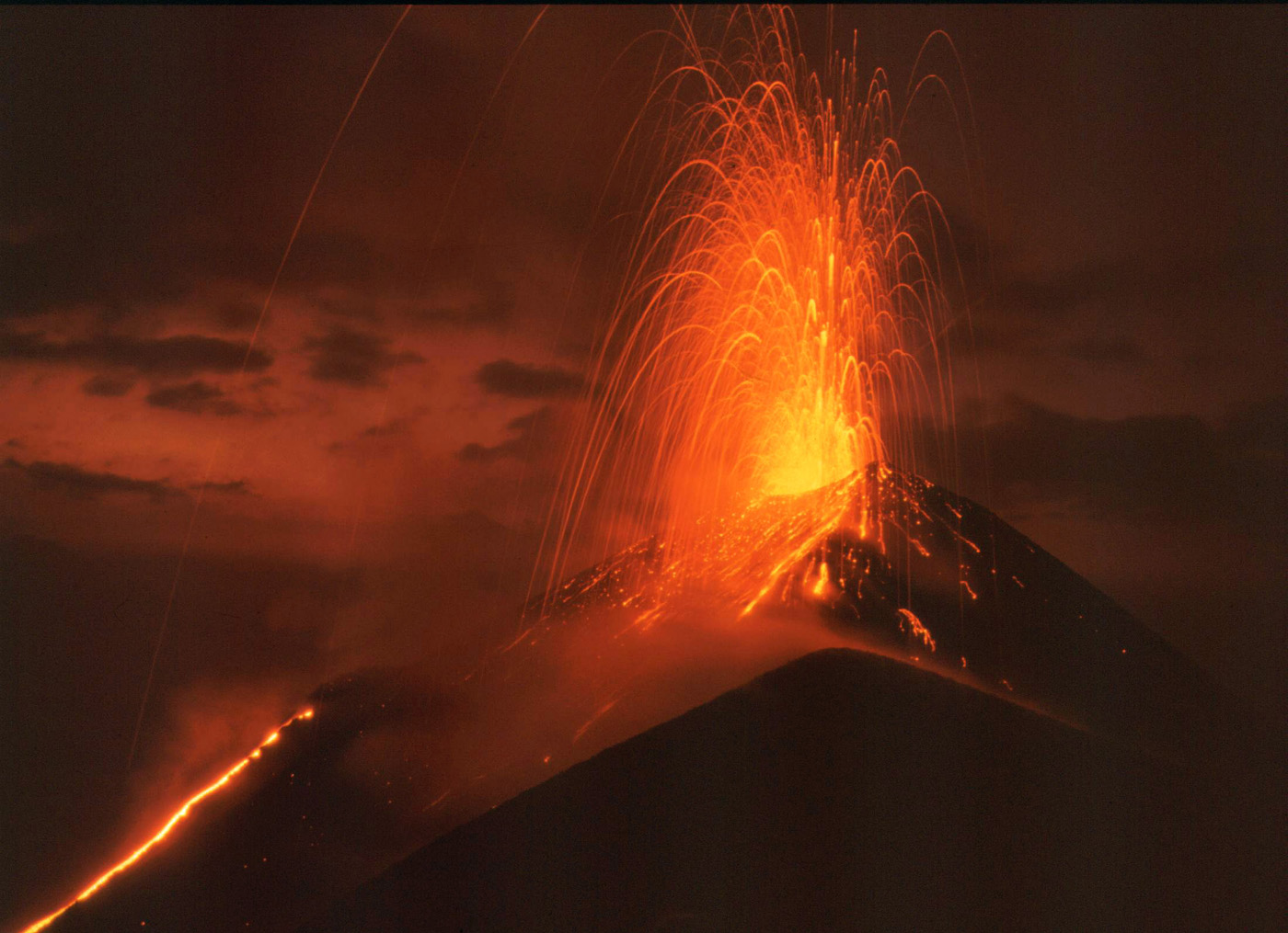 Strombolianische Eruption und Lavastrom des Pacaya